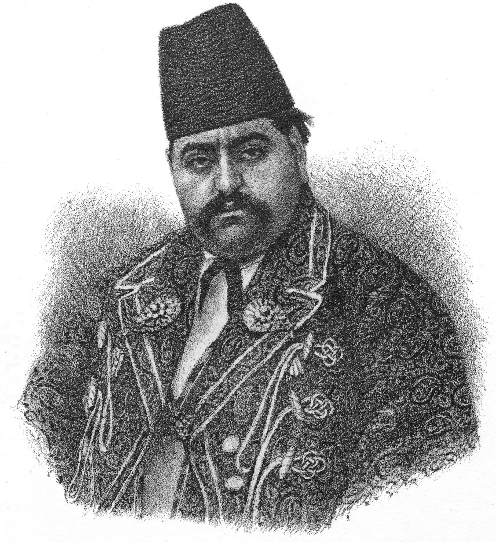 محمدتقی میرزا رکن‌الدوله حاکم خراسان و سیستان در زمان ناصرالدین شاه قاجار